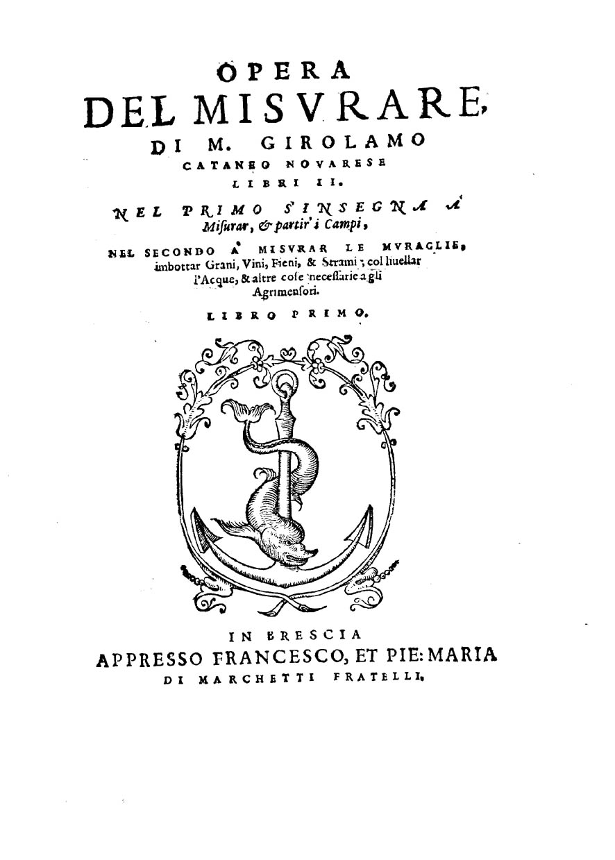 Opera del misurare, di M. Girolamo Cataneo nouarese libri 2. Nel primo s'insegna a misurar, & partir'i campi …. - In Brescia : appresso Francesco, et Pie: Maria di Marchetti fratelli, [s. d.] (In Brescia : appresso Francesco, et Pie. Maria di Marchetti fratelli, 1572). - [4], 55 [i.e. 57, 1] c. : ill. ; 4º .